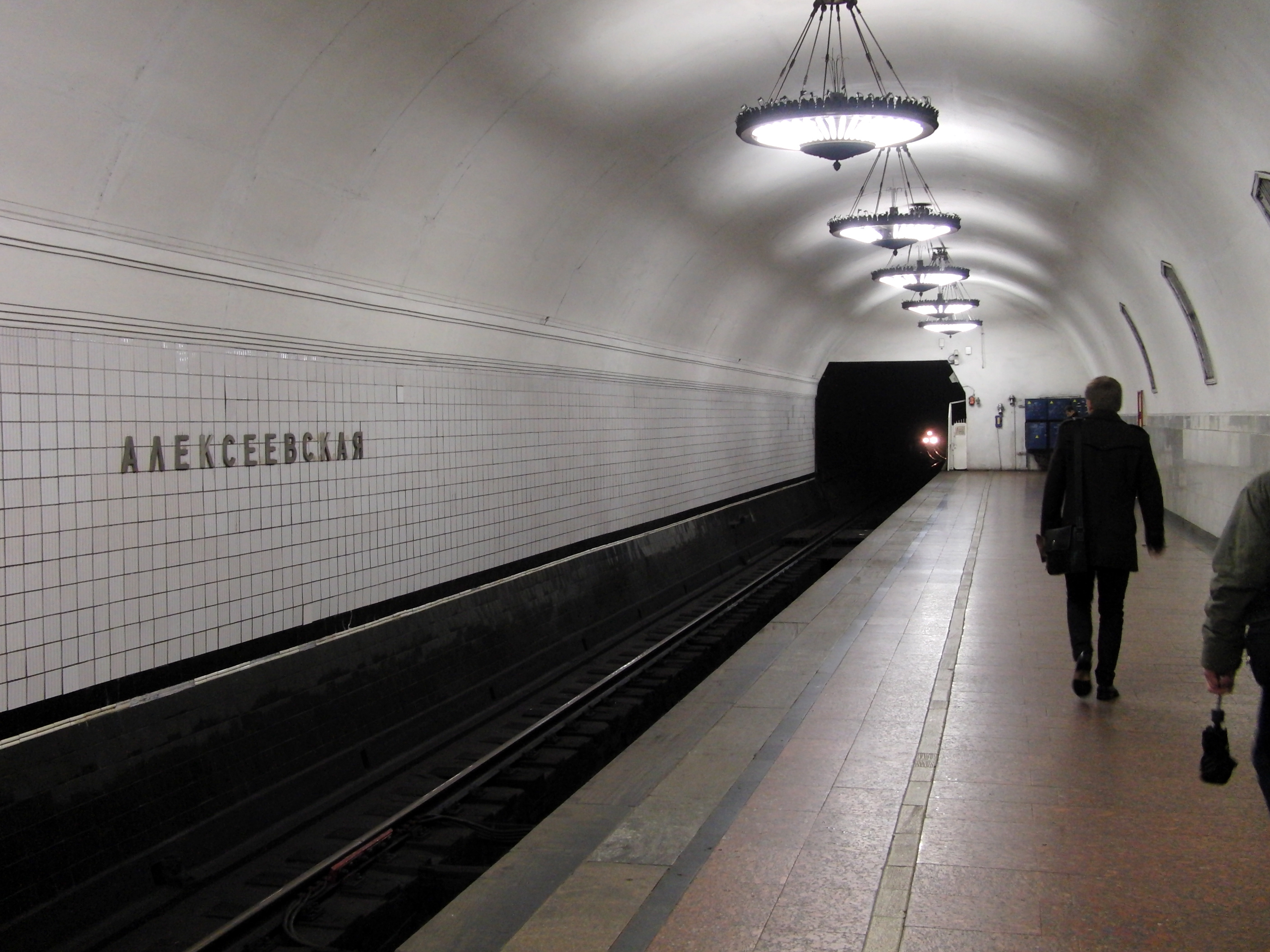 Alexeyevskaya (Алексеевская)